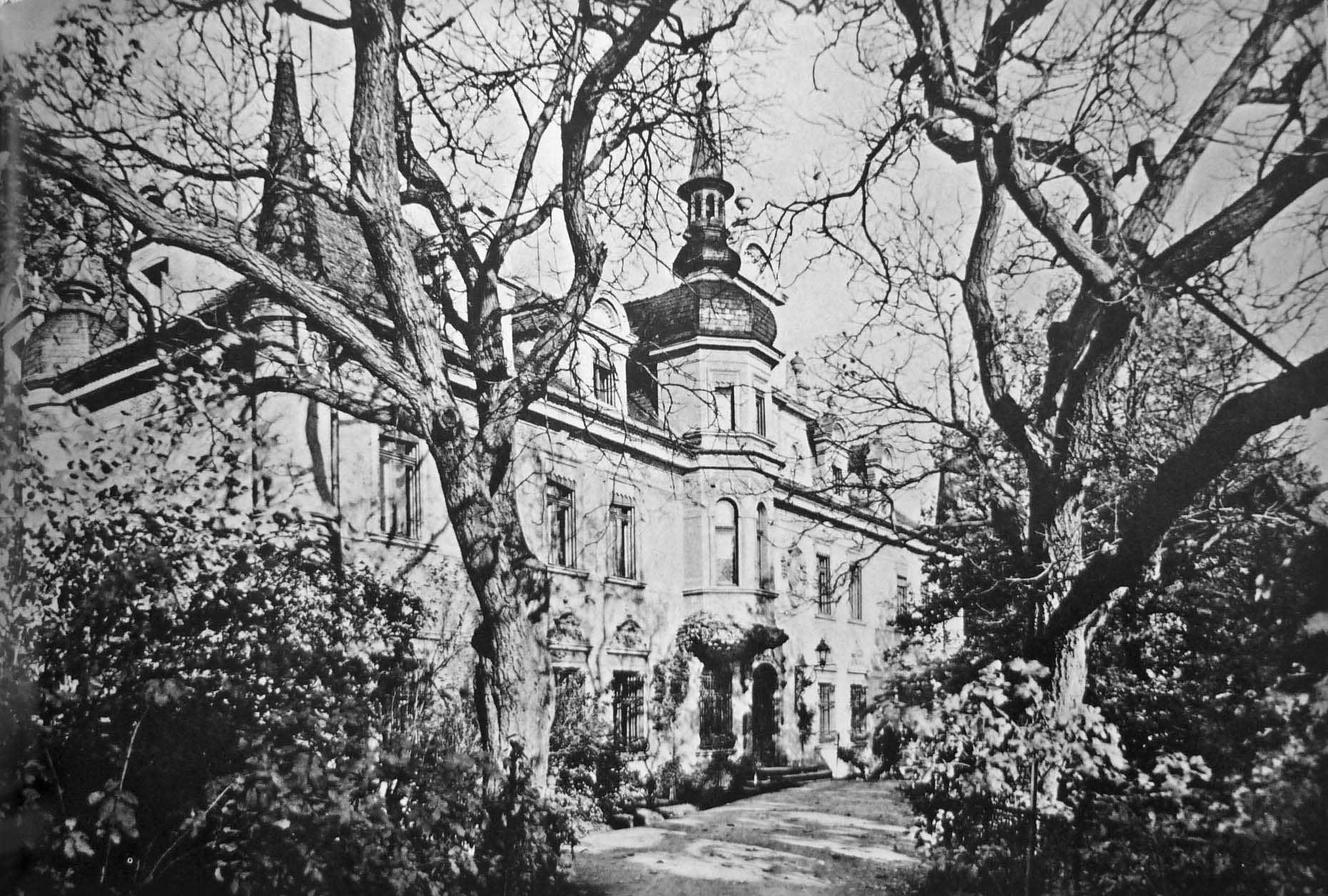 Schloss Kohlhöhe bei Striegau (Strzegom) in Niederschlesien